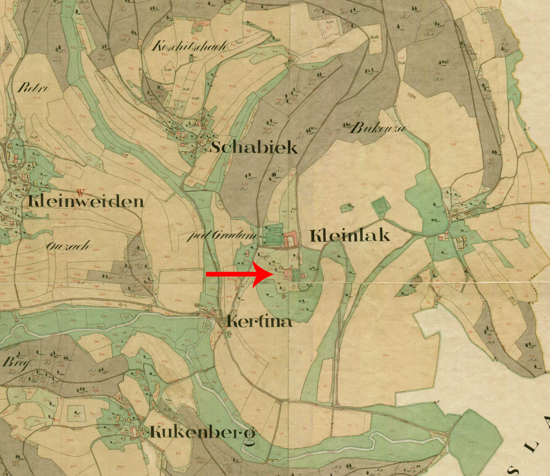 Franciscejski kataster za Kranjsko, 1823-1869